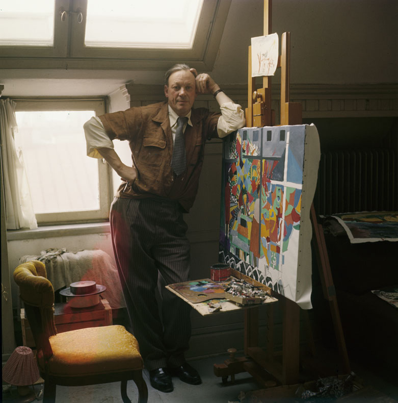 Målaren Sven Erixson, "X-et".